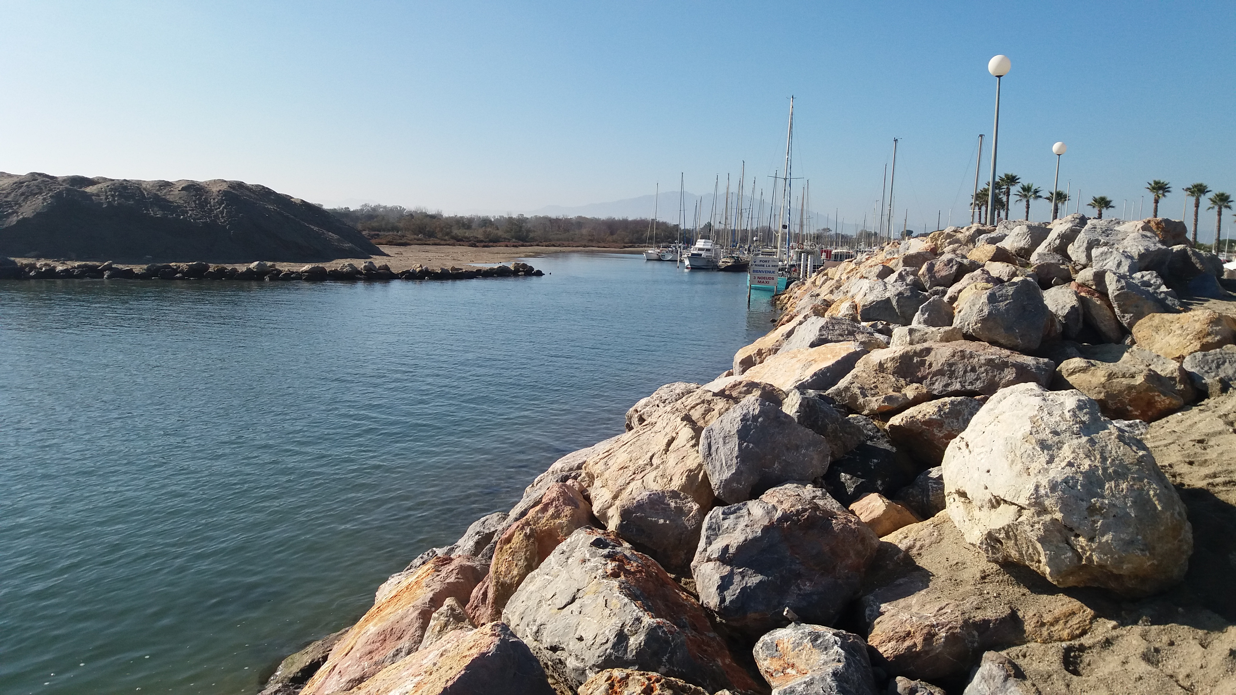 Tram final de l'Eixau Vell